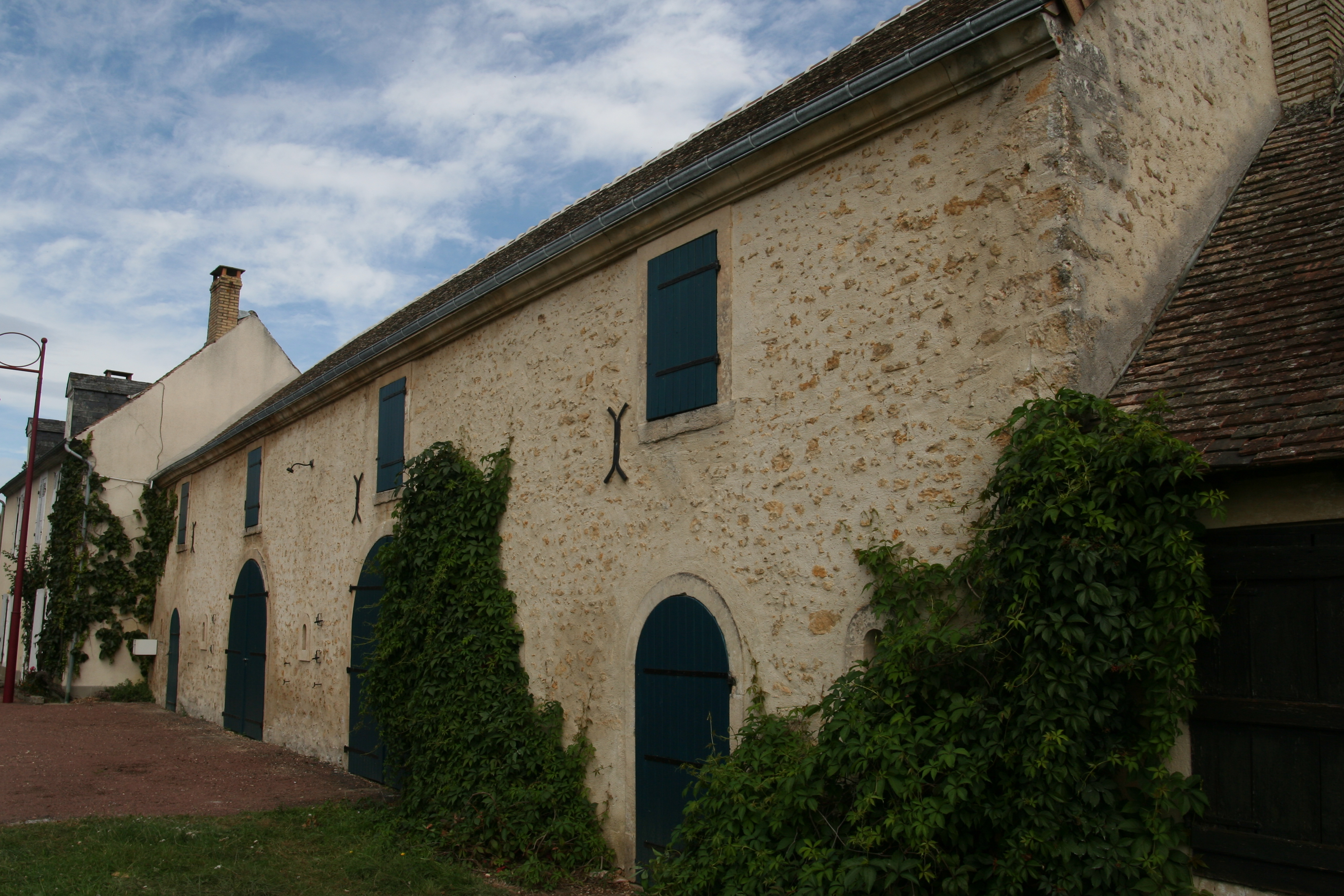 Ancienne grange à Rouperroux-le-Coquet.